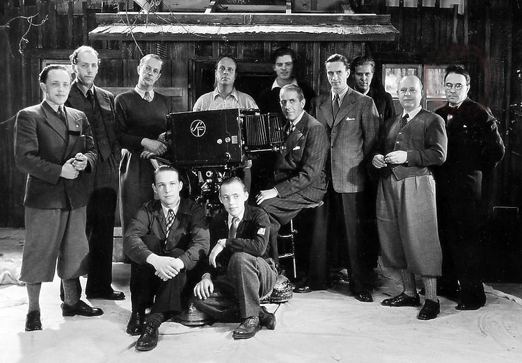 Louis Huch, 1896–1961, svensk fotograf och porträttfotograf. Han var verksam inom filmbranchen från 1919 och arbetade som stillbilds- och porträttfotograf vid Svensk Filmindustri och dokumenterade ett flertal av Ingmar Bergmans filmer under åren 1944–57. På detta foto står han längst th. Övriga män är fotografer och teknisk personal vid Svensk Filmindustri. Bland dessa återfinns Martin Bodin, Gustaf Boge, Gösta Roosling, Arne Lagercrantz, Åke Dahlqvist och Gunnar Fischer.